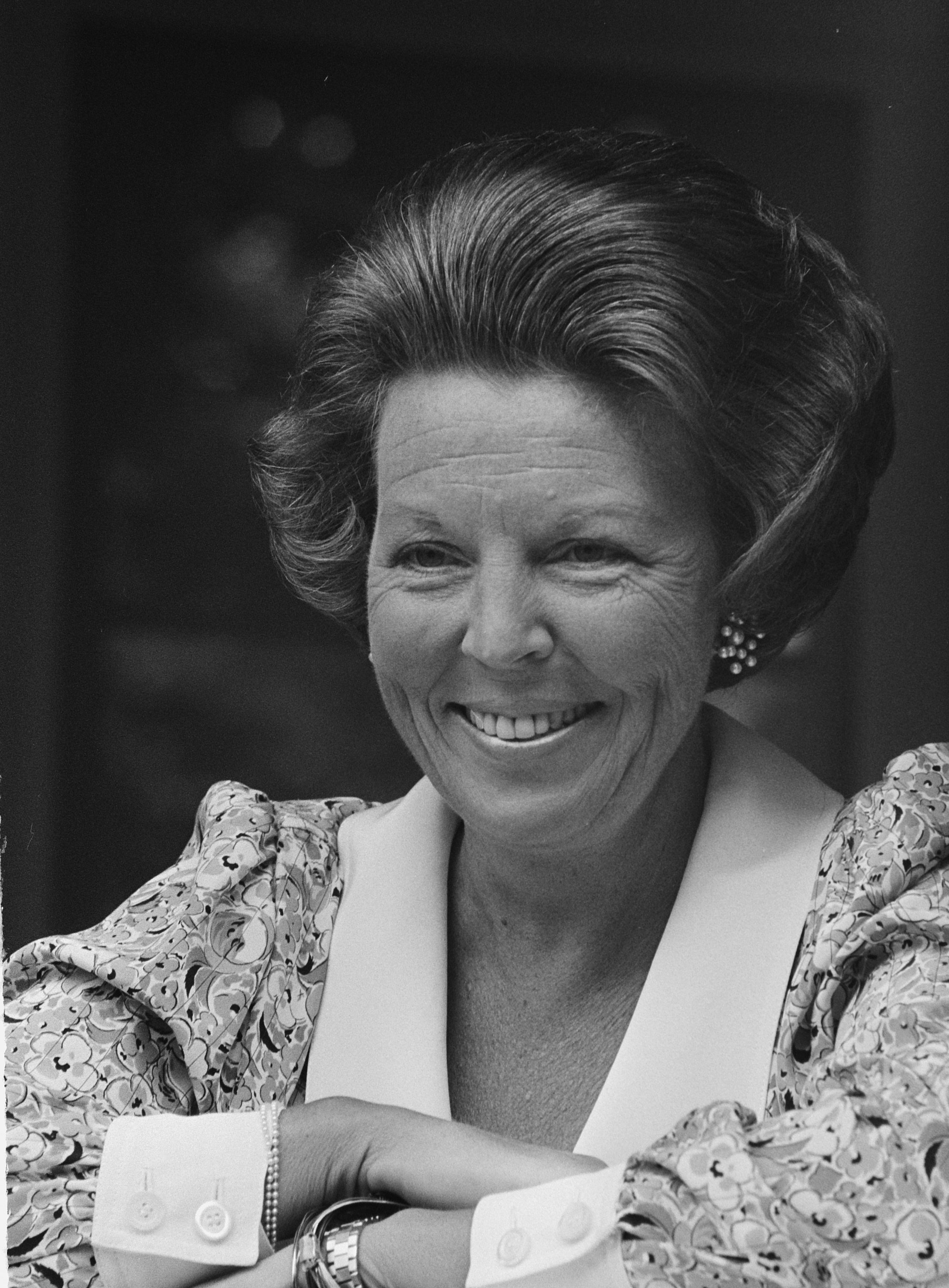 Collectie / Archief : Fotocollectie Anefo Reportage / Serie : [ onbekend ] Beschrijving : Foto-uurtje Koninklijke Familie op Huis Ten Bosch ; Koningin Beatrix , koppen Datum : 8 augustus 1986 Trefwoorden : koninginnen Persoonsnaam : Beatrix, koningin Fotograaf : Croes, Rob C. / Anefo Auteursrechthebbende : Nationaal Archief Materiaalsoort : Negatief (zwart/wit) Nummer archiefinventaris : bekijk toegang 2.24.01.05 Bestanddeelnummer : 933-7239